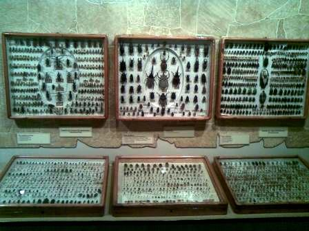 Часть коллекции Ивана Михайловича Рубинского. 6 коробов с представителями отряда Жесткокрылые. Экспонируется в Музее природы Кострмской области.